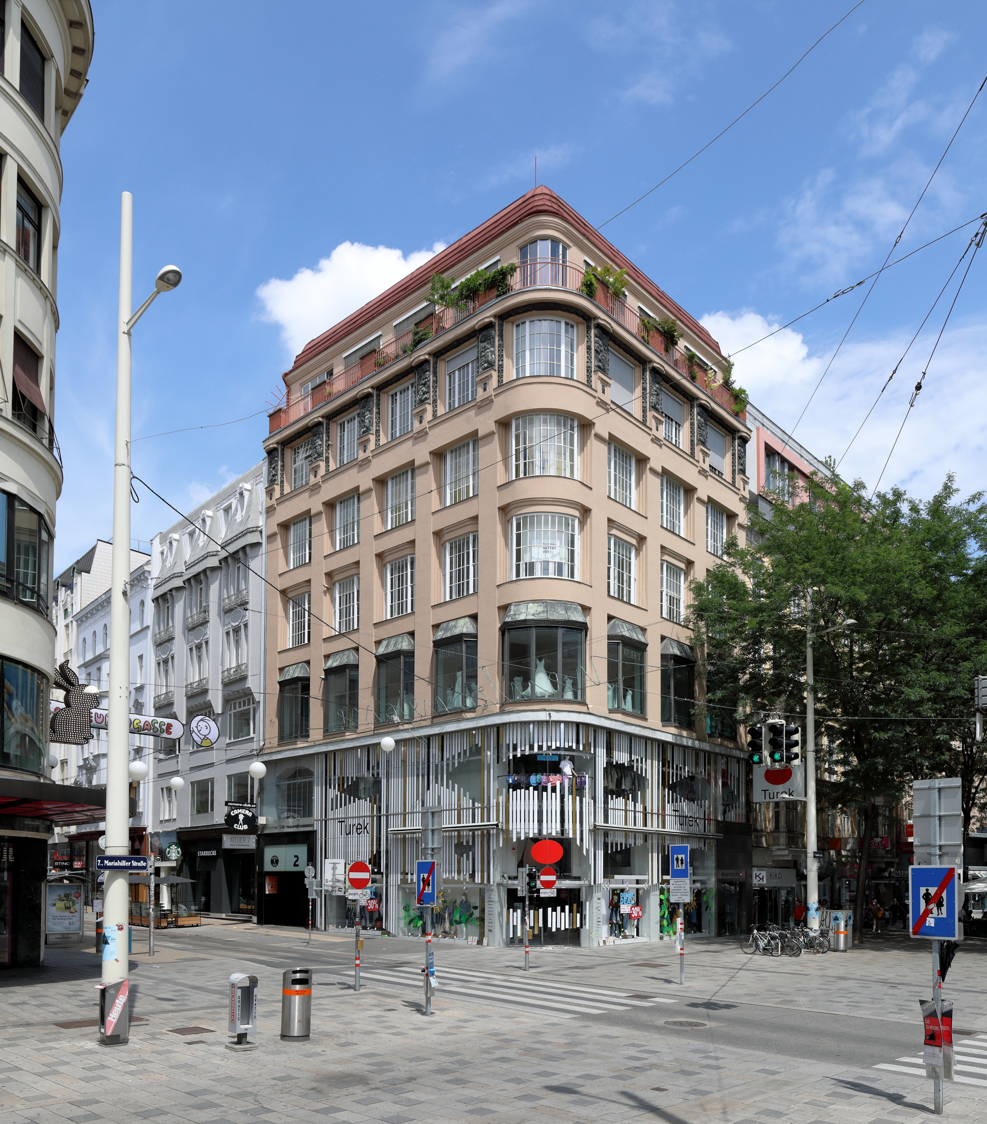 Das Wohn- und Geschäftshaus Ecke Mariahilfer Straße 68 / Neubaugasse 2 im 7. Wiener Bezirk Neubau. Das Gebäude wurde 1912 nach Plänen des Architekten Leopold Fuchs errichtet.